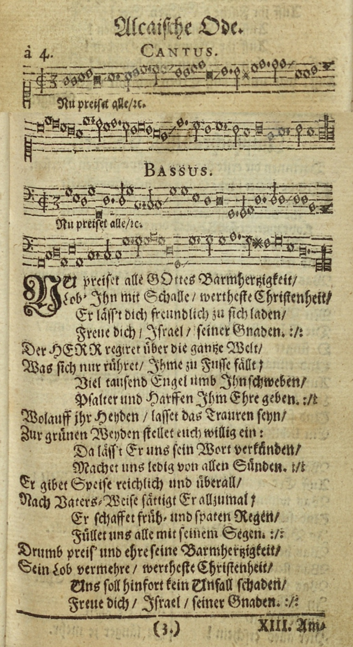 Nun preiset alle Gottes Barmherzigkeit, Druckfassung 1644